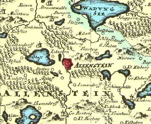 Olsztyn i okolice na mapie z 1755 roku